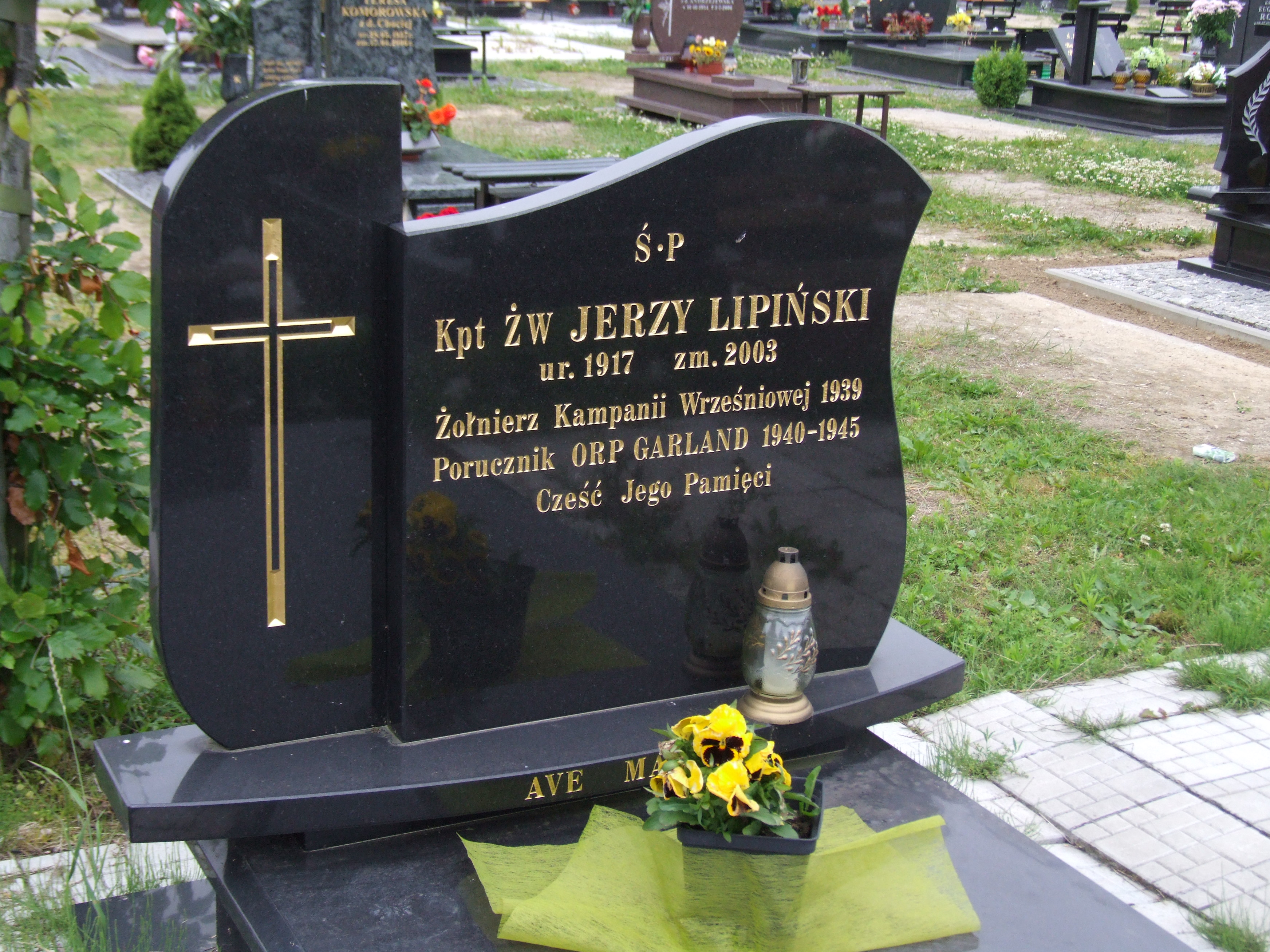 Gdynia-Oksywie Cmentarz Marynarki Wojennej